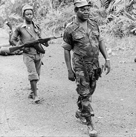 chef du peuple